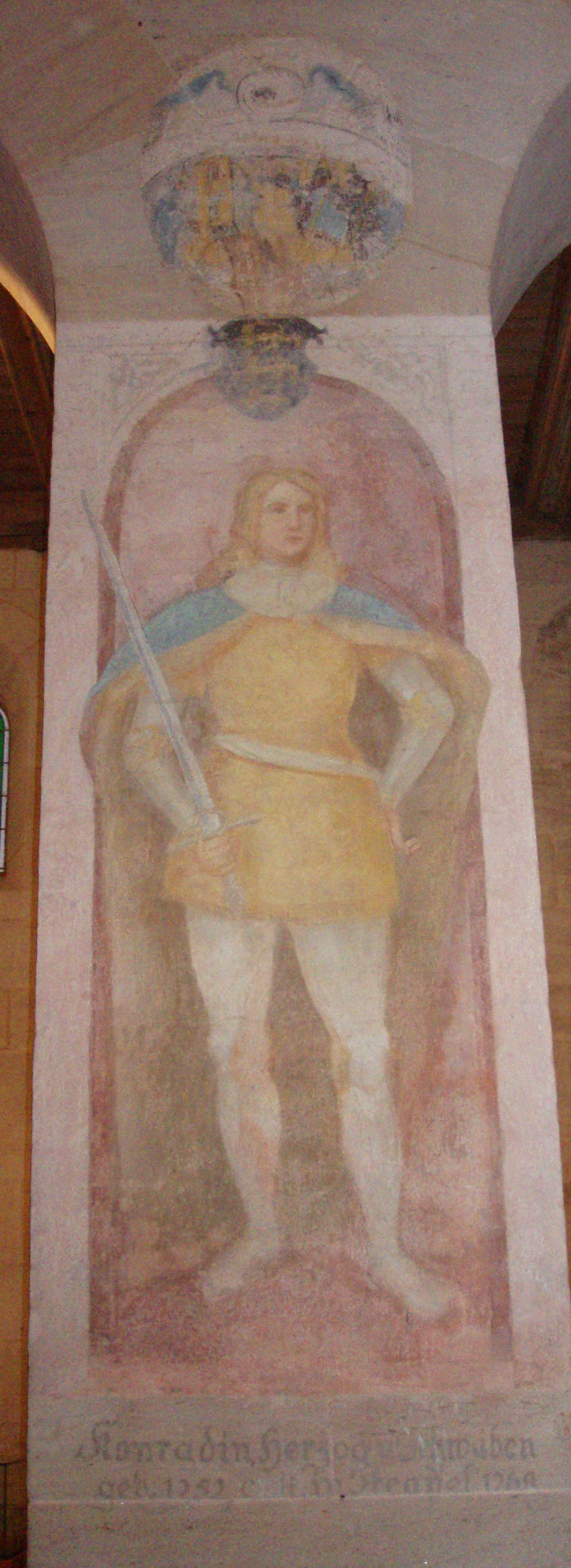 Kloster Lorch, Kirche